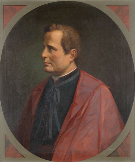 Prälat Alois Flir, Rektor des deutschen Kollegs S. Maria dell'Anima in Rom